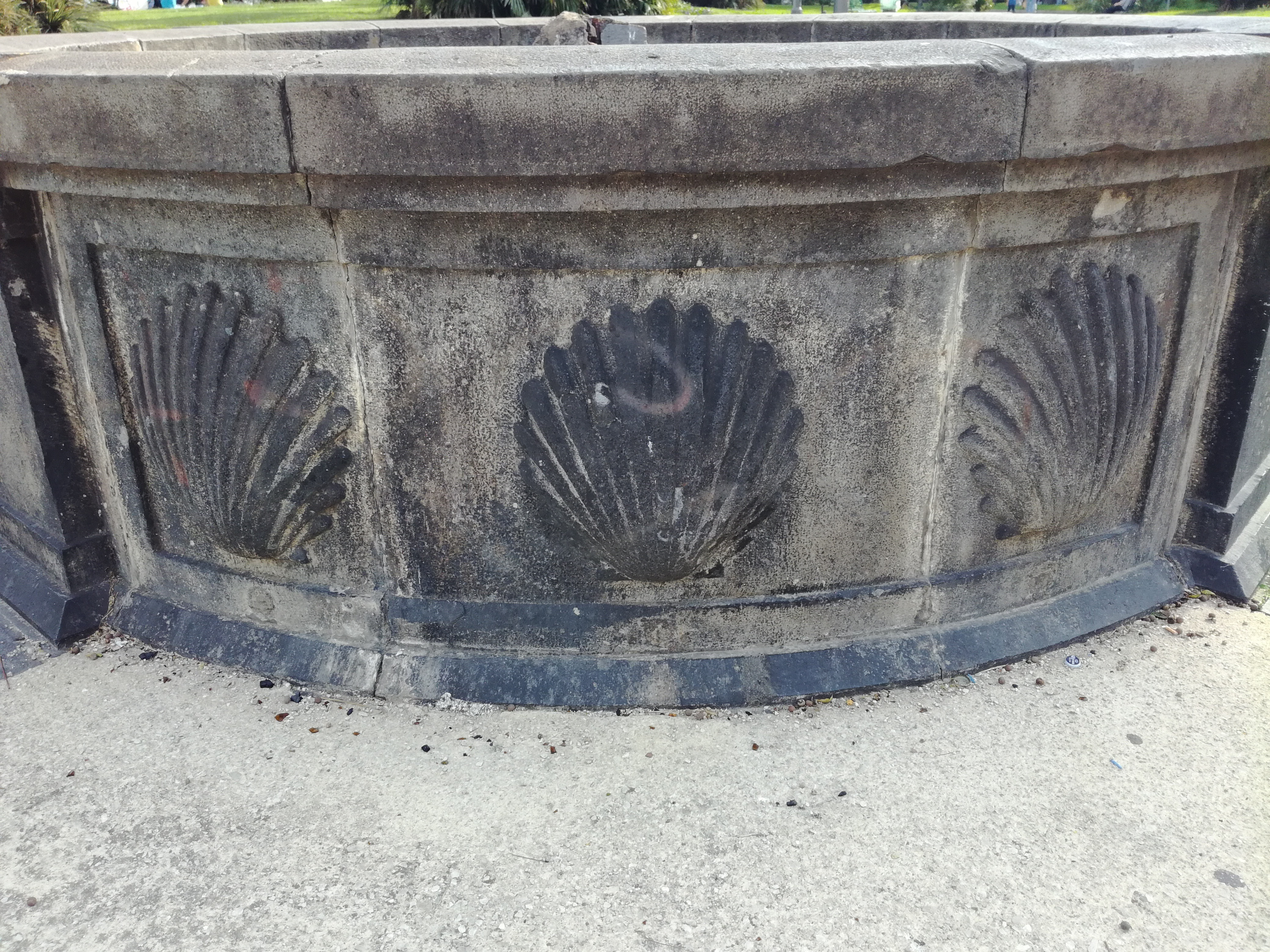 Fontana della Conchiglia